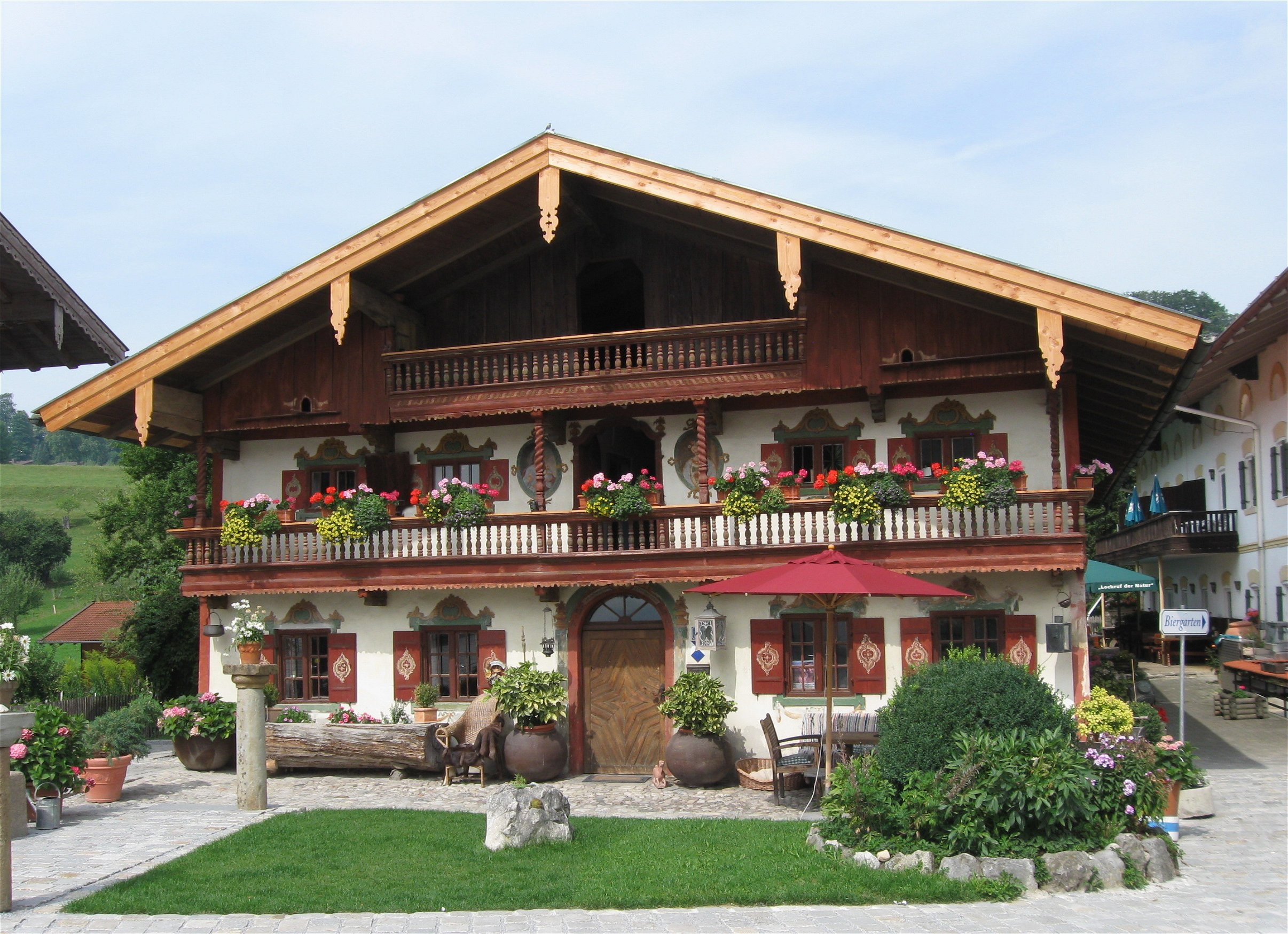 Dorfplatz 6; Schusterhäusl, ehem. Mesnerhaus, mit vorstehendem Flachsatteldach, reiche Fassadenmalerei von 1725, Türgewände bez. 1794.